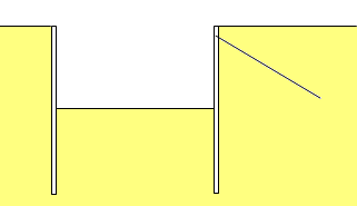 Plaatje van een bouwkuip met ankers, getekend door Wikipediagebruiker: GeeKaa 24 aug 2005 09:33 (CEST)